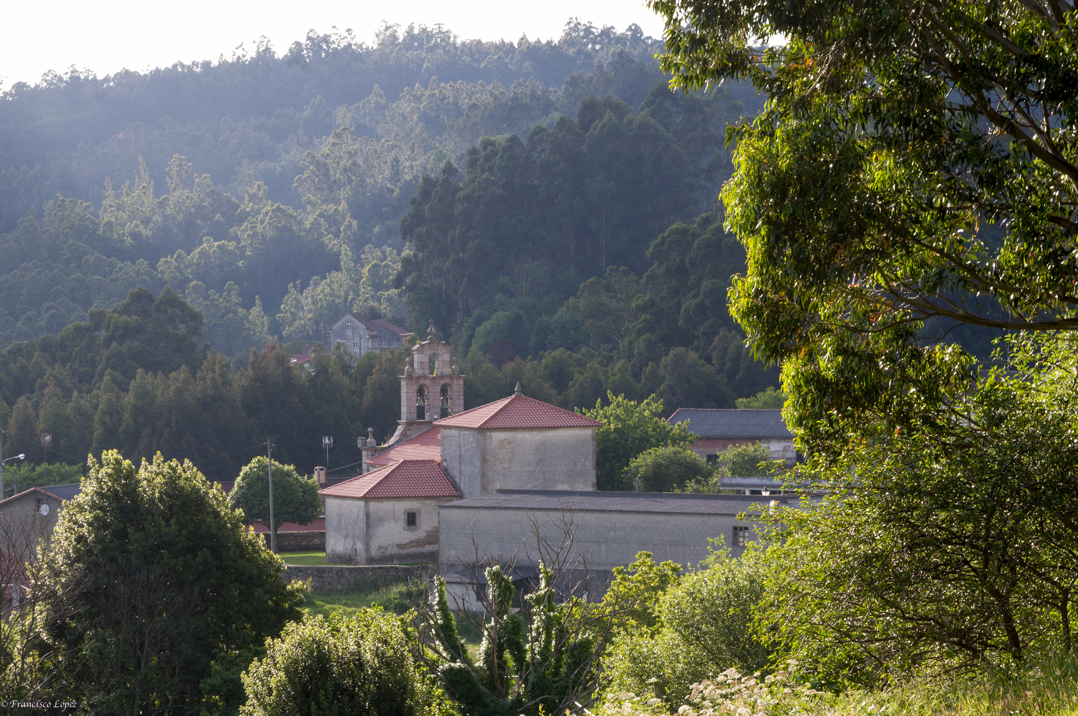 Iglesia de San Pedro de Grandal.